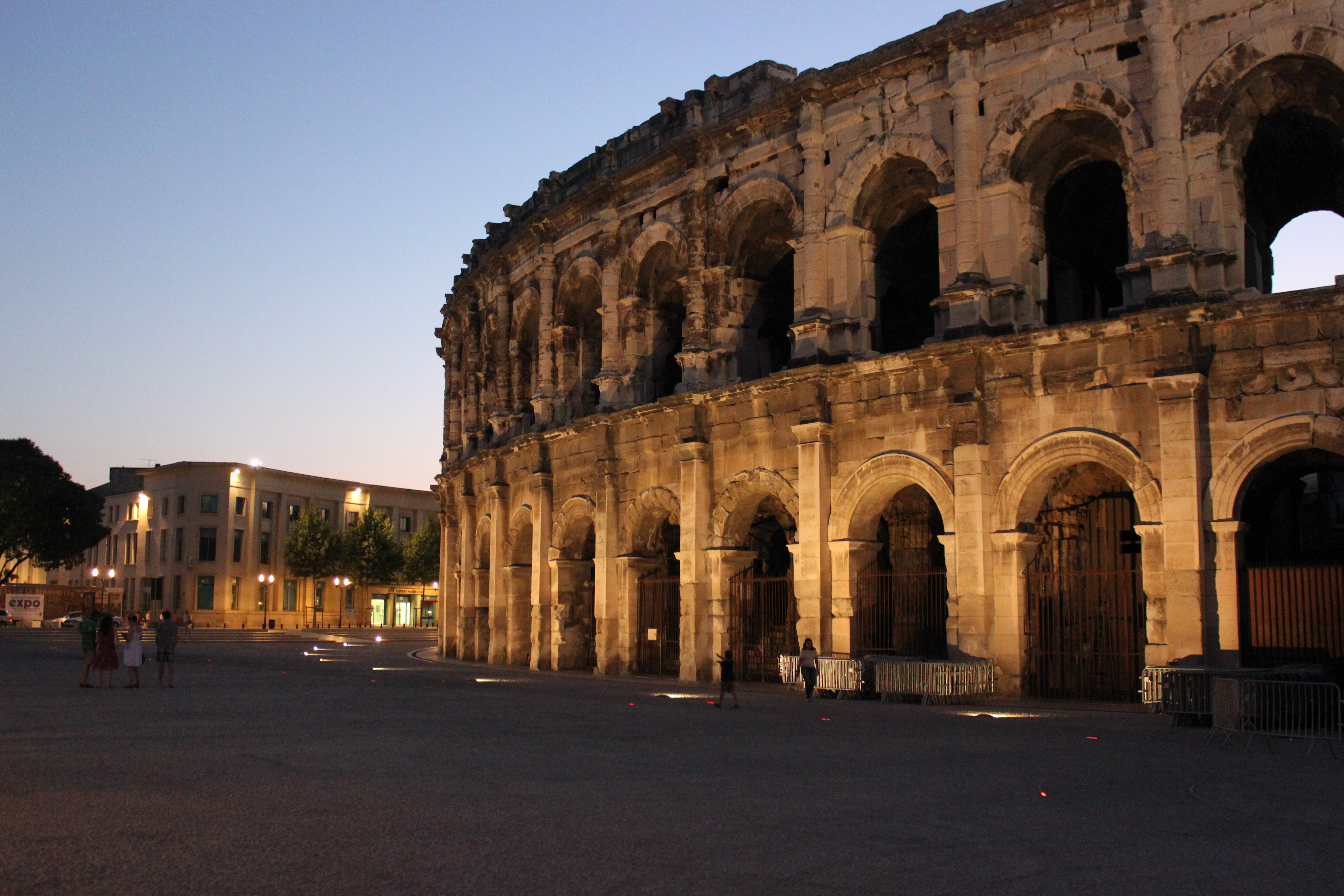 Les Arènes de Nîmes ont été construites à la fin du Ier siècle par les romains pour divertir les habitants.